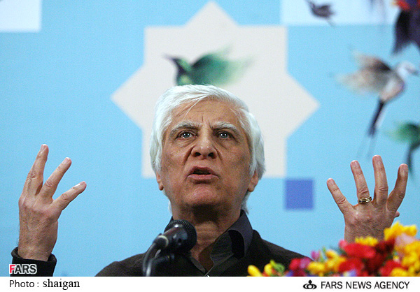 در نشست خبری فیلم وقتی همه خوابیم، بیست و هفتمین دوره‌ی جشنواره‌ی فیلم فجر